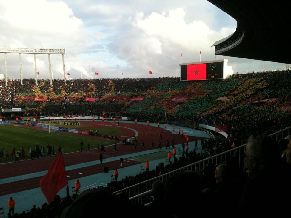 tifo des supporters des FAR lors de la final de la coupe du trône 2012